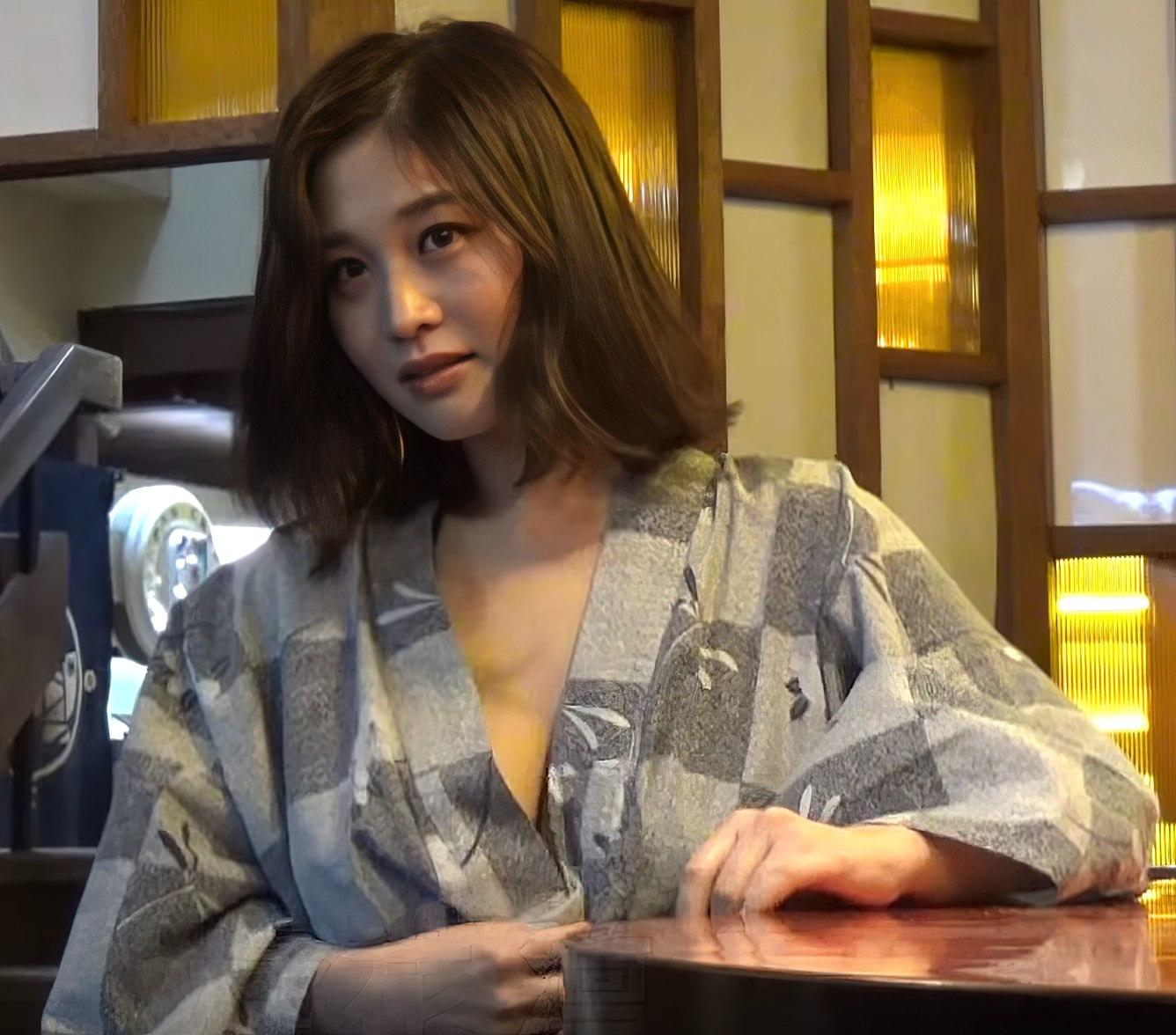 高橋凛です。